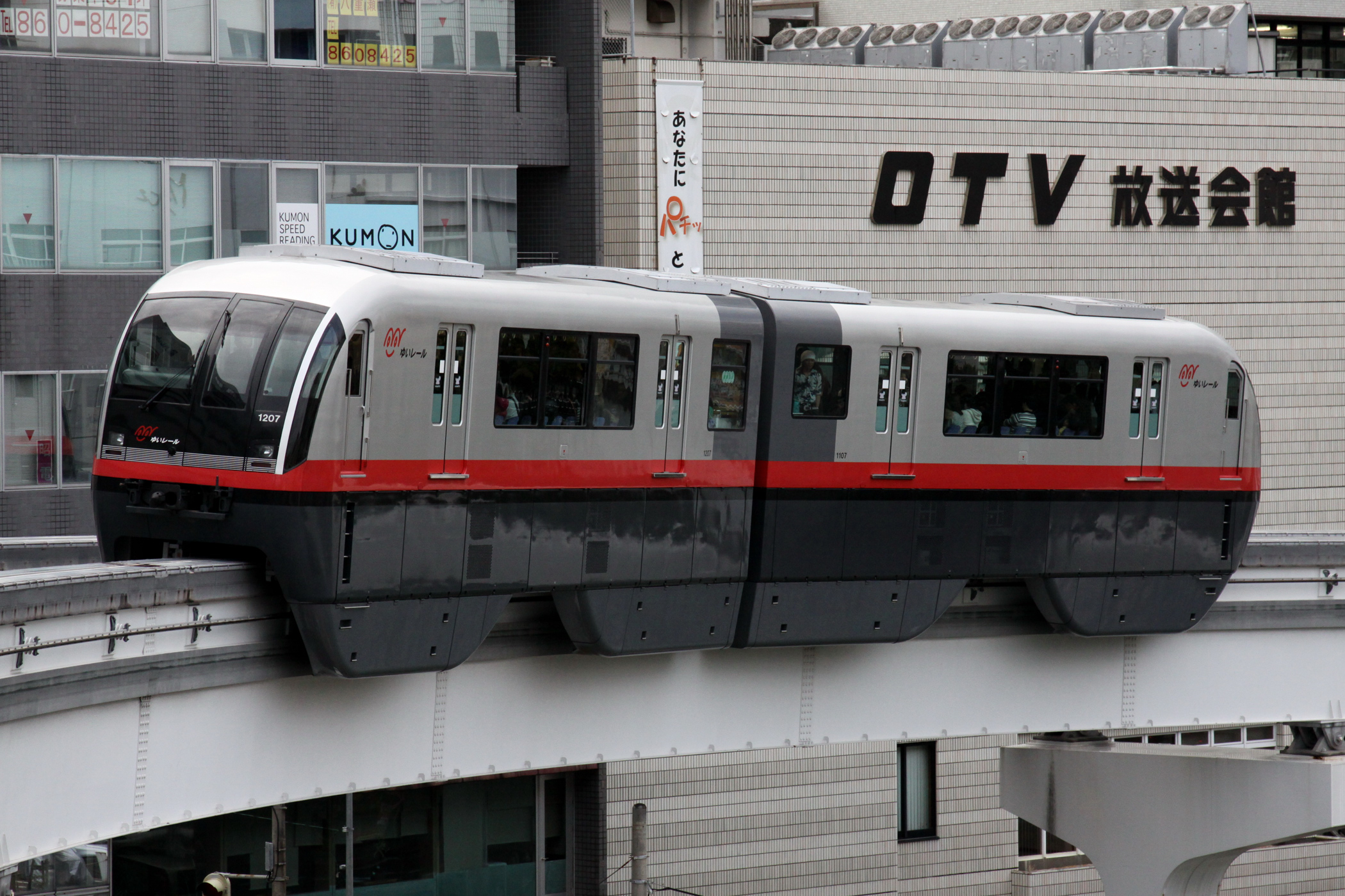 沖縄都市モノレール1000形電車1207+1107の1編成。沖縄テレビ本社前。